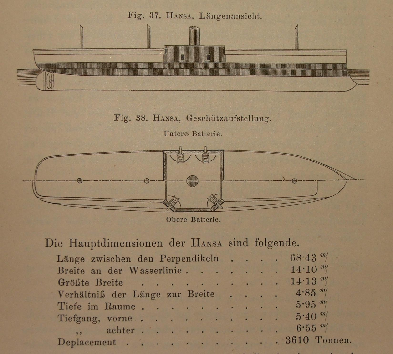 SMS Hansa aus: von Kronenfels, J. F.: Das schwimmende Flottenmaterial der Seemächte. Eine kurzgefasste Beschreibung der wichtigsten europäischen, amerikanischen und asiatischen Kriegsschiffe der neueren und neuesten Zeit. A. Hartleben's Verlag, Wien. Pest. Leipzig 1881.